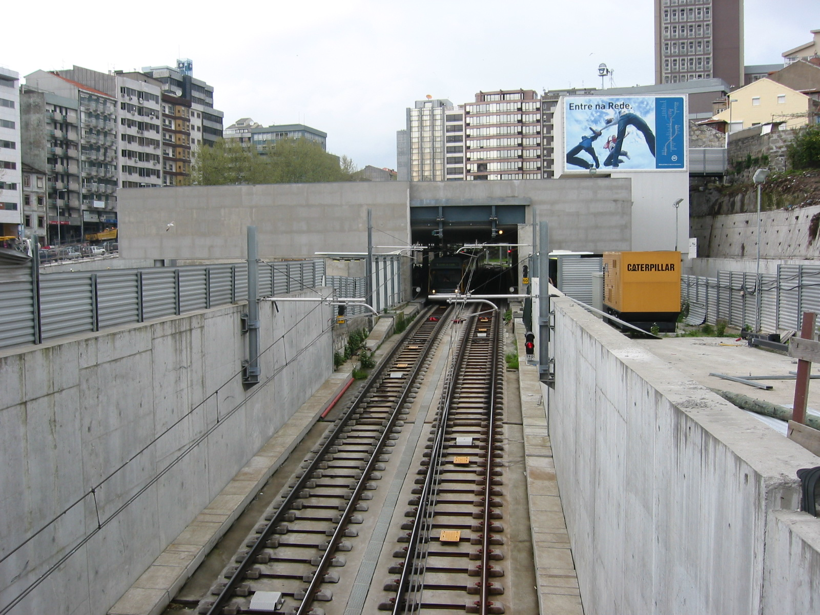 Estação de Metro da Trindade, Porto